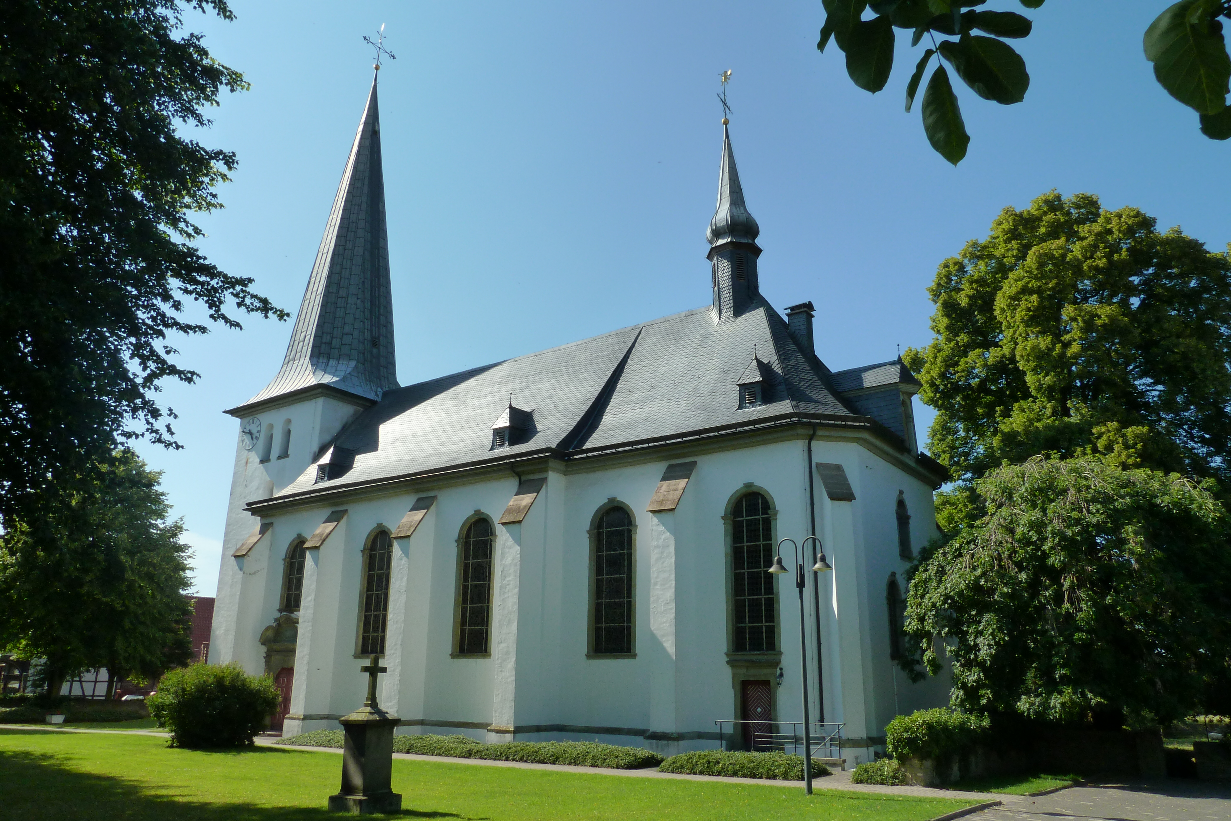 Die St.-Nikolaus-Kirche in Anröchte-Altengeseke.